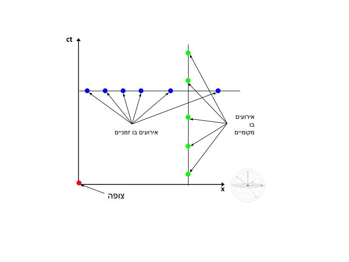 אירועים במרחב מינקובסקי